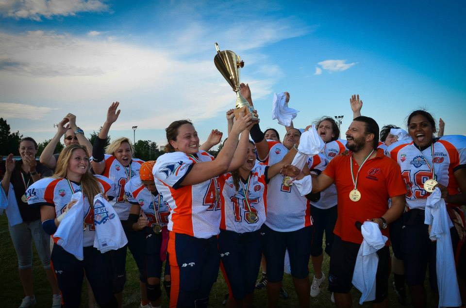 Prima storica premiazione del football in rosa